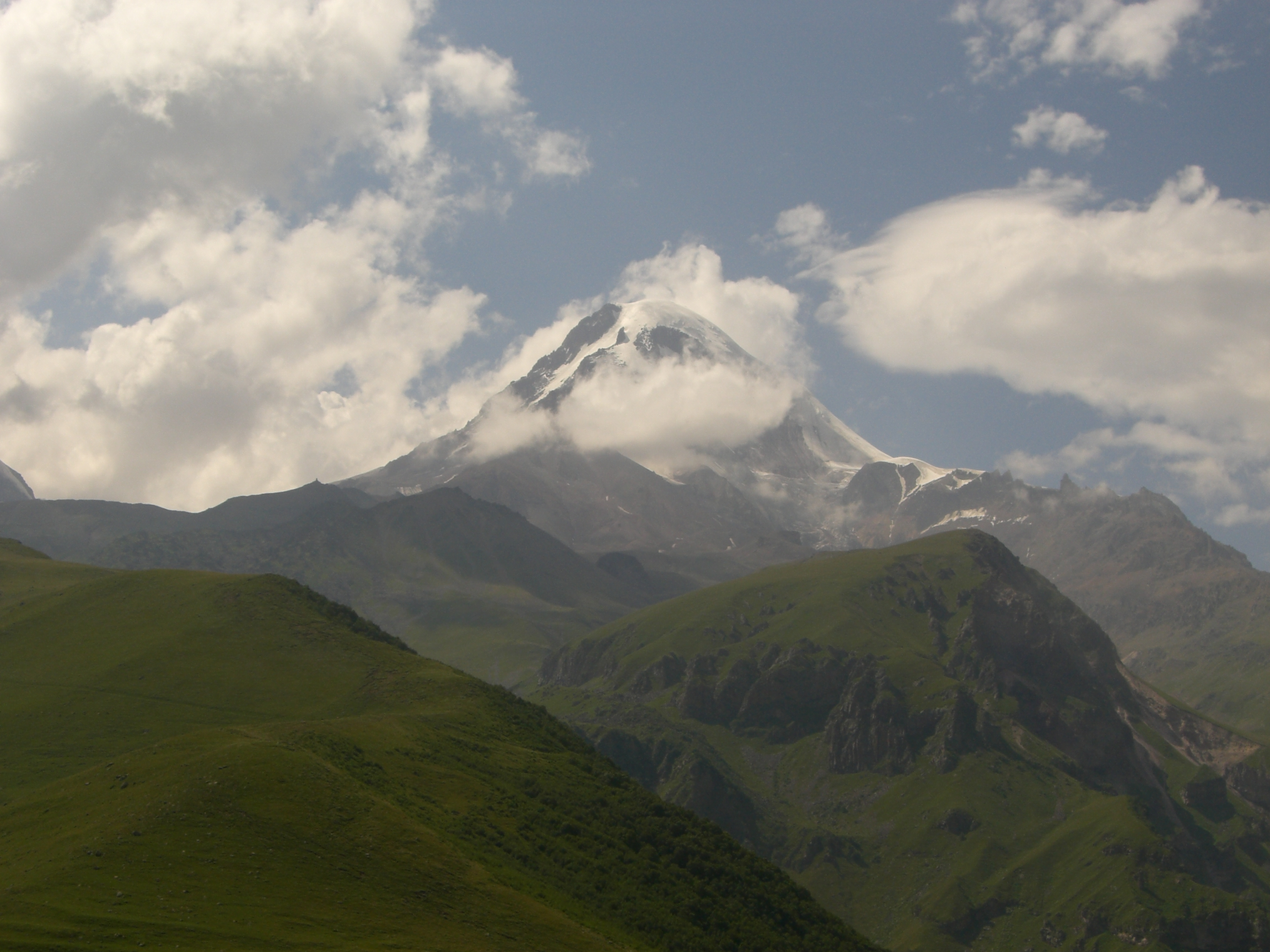 Kasbeghi